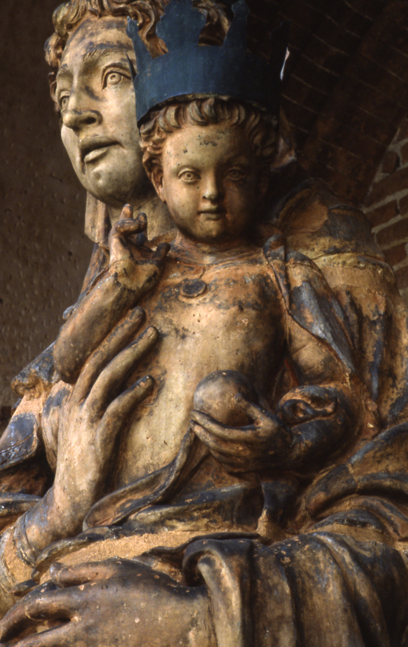 Servizio fotografico : Ferrara, 1982 / Paolo Monti. - Foglio: 1, Fotogrammi complessivi: 20/20 : Diapositiva, sviluppo cromogeno/ pellicola ; 35 mm. - ((Sullo chassis della diapositiva n. 01 iscrizione manoscritta: "Fe - Duomo". - Confronti con negativi (b/n - gelatina bromuro d'argento/ pellicola - 35mm). - Occasione: Lavori di restauro delle sculture e decorazioni scultoree. - Fonte: Rubrica di Paolo Monti: Diapositive 24x36mm (1948-1982), presso Archivio Paolo Monti. Rubrica con elenco soggetti e numeri di inventario (da 1 a 1000) corrispondenti ai fogli a tasche in pvc in cui sono contenute le diapositive.